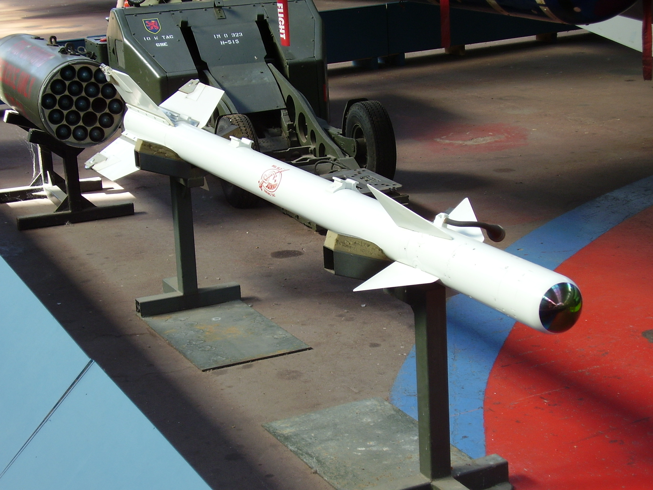 Royal Military Museum Brussels, Musée Royal de l'Armée, Koninklijk Museum van het Leger en de Krijgsgeschiedenis